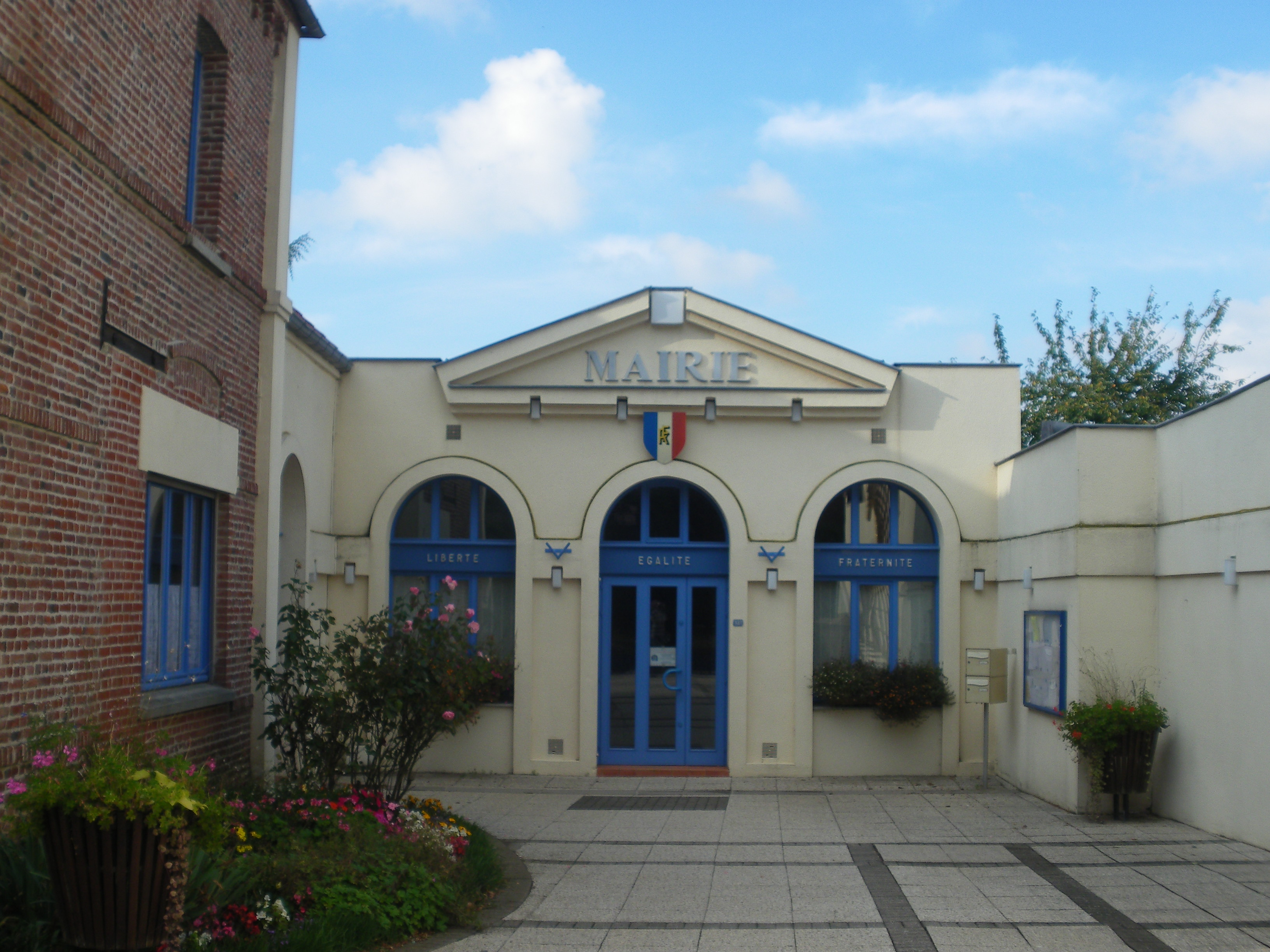 Vue de la mairie de Fouquières-lès-Béthune.